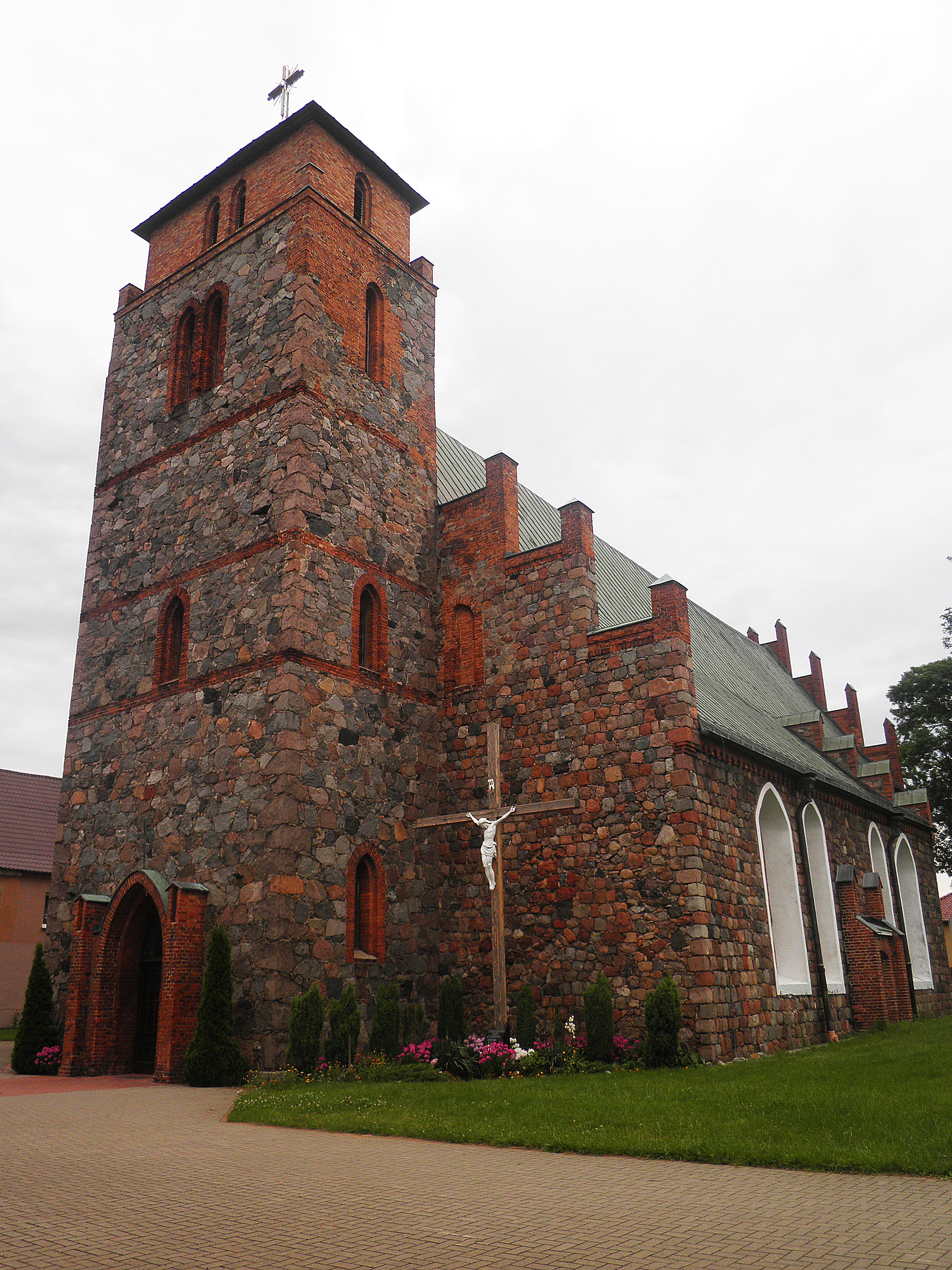 Banie - Kościół M.B. Wspomożenia Wiernych